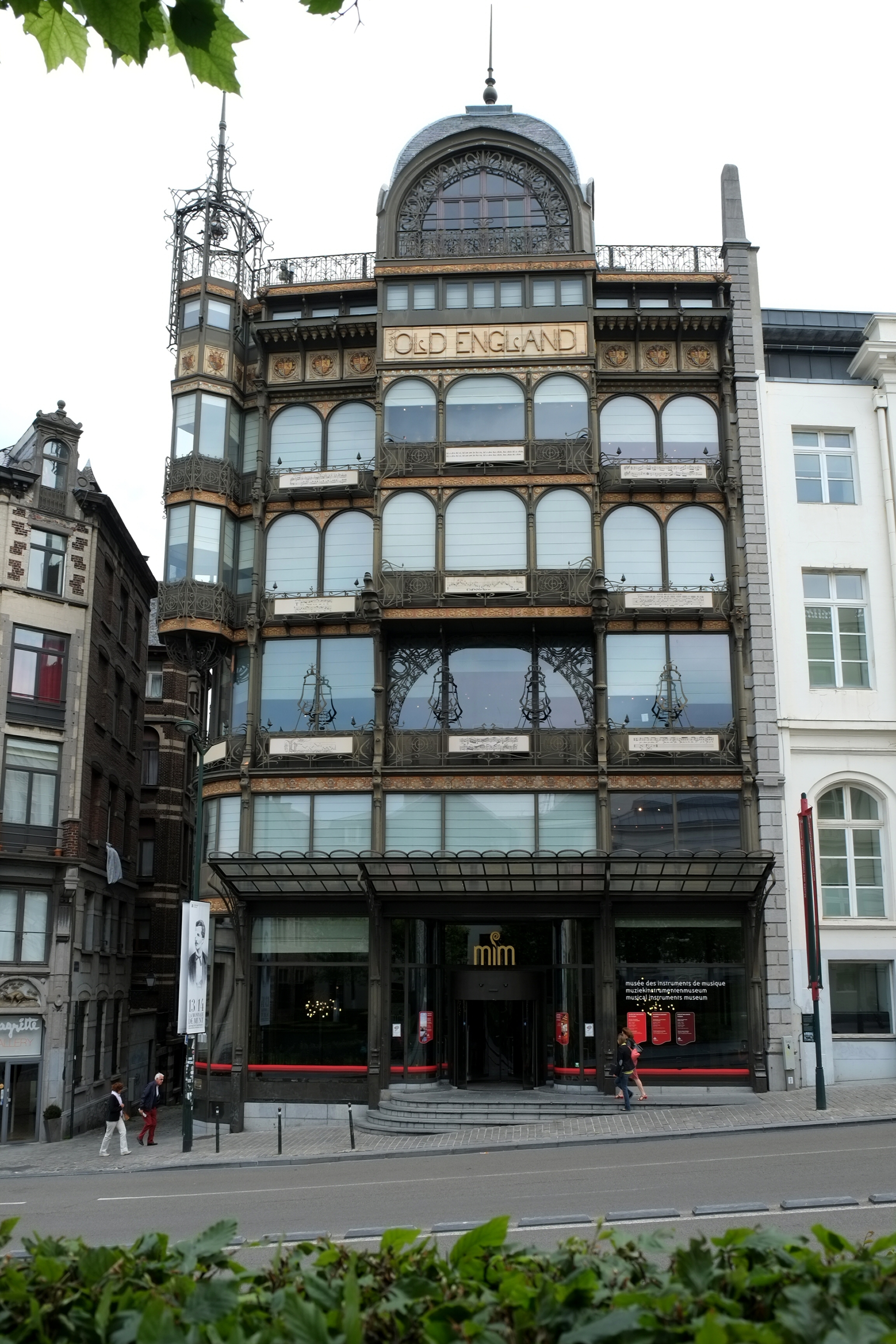 Musée des Instruments de Musique Bruxelles